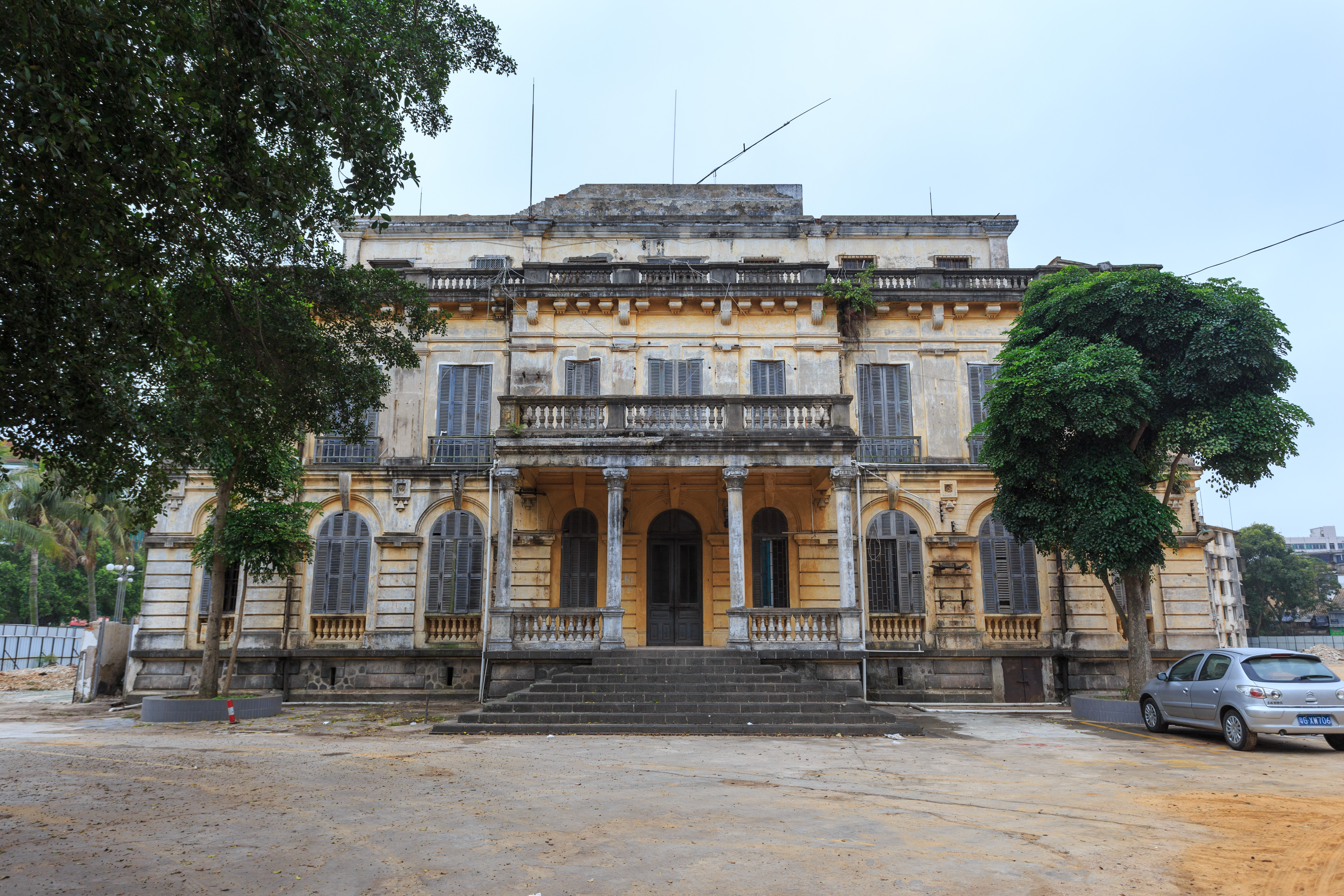 广州湾法国公使署旧址和法军指挥部旧址—— 广州湾法军指挥部旧址